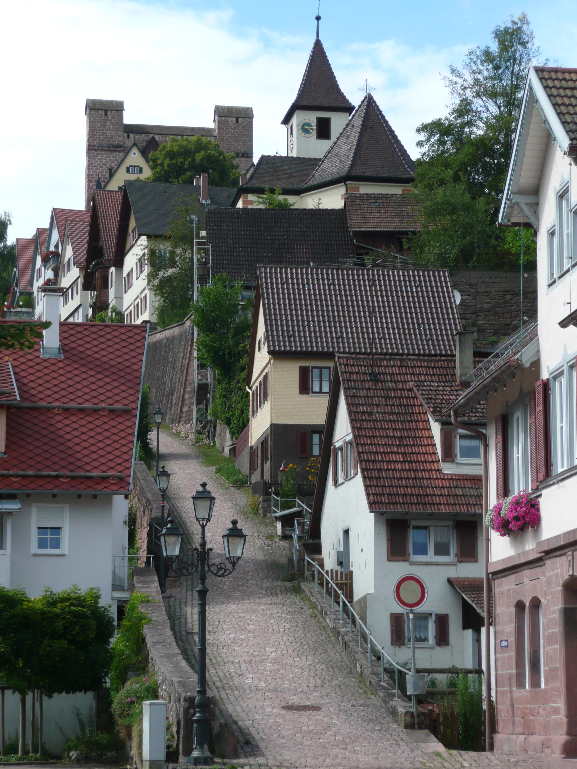 Berneck